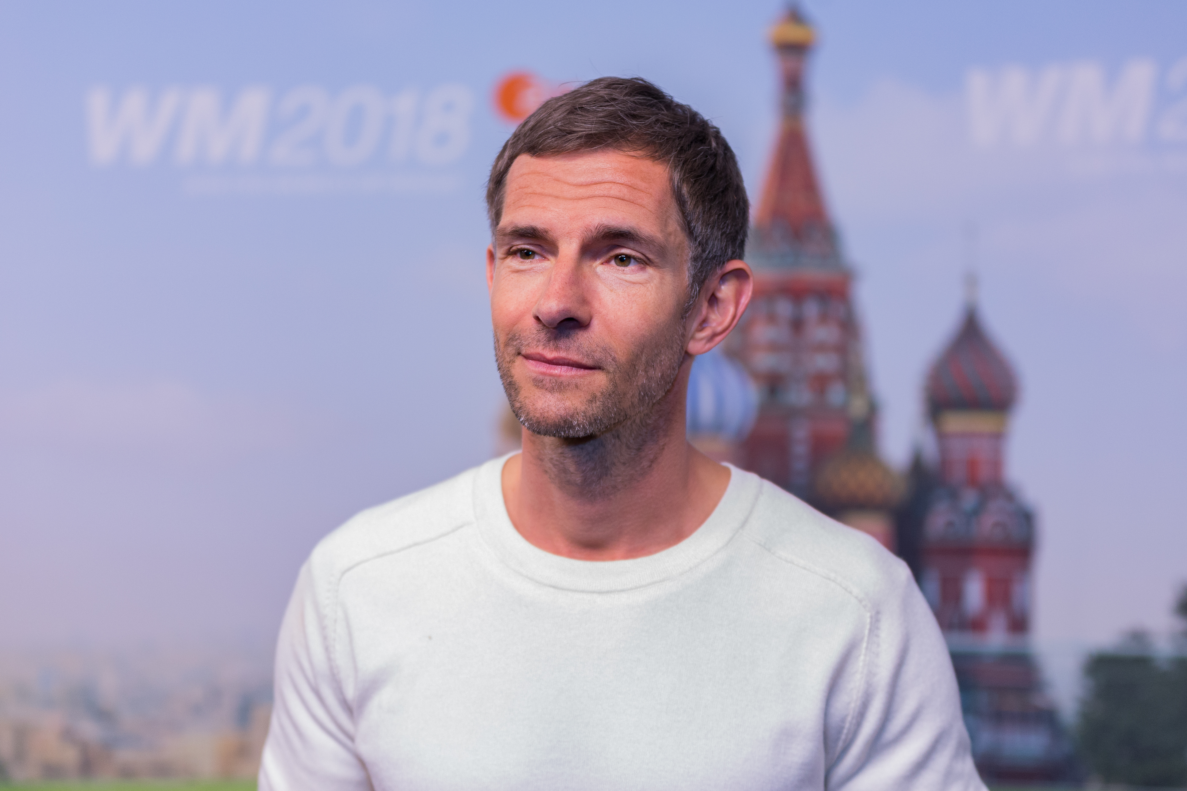 Micky Beisenherz moderiert bei der WM 2018 für die ARD die Sendung WM-Kwartira